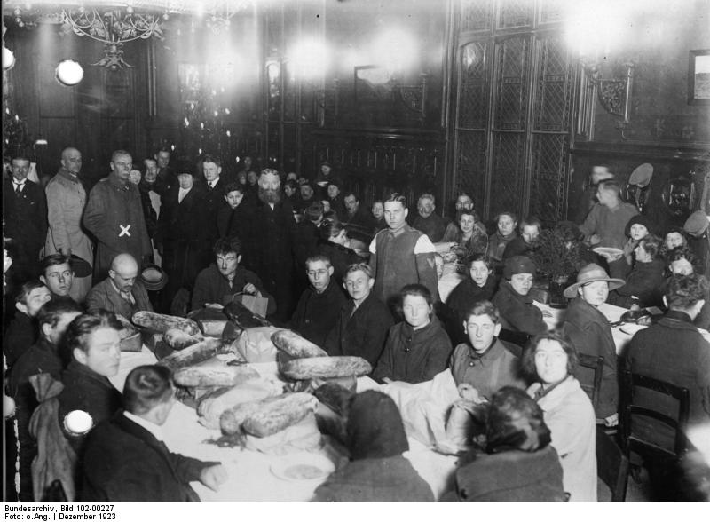 Reichswehr-Weihnachten für die Ärmsten Berlin's. Arme Leute als Gäste der Reichswehr während der Weihnachtsfeier. General v. Seeckt (x) Kommandeur der Reichswehr wohnt der Weihnachtsfeier bei.